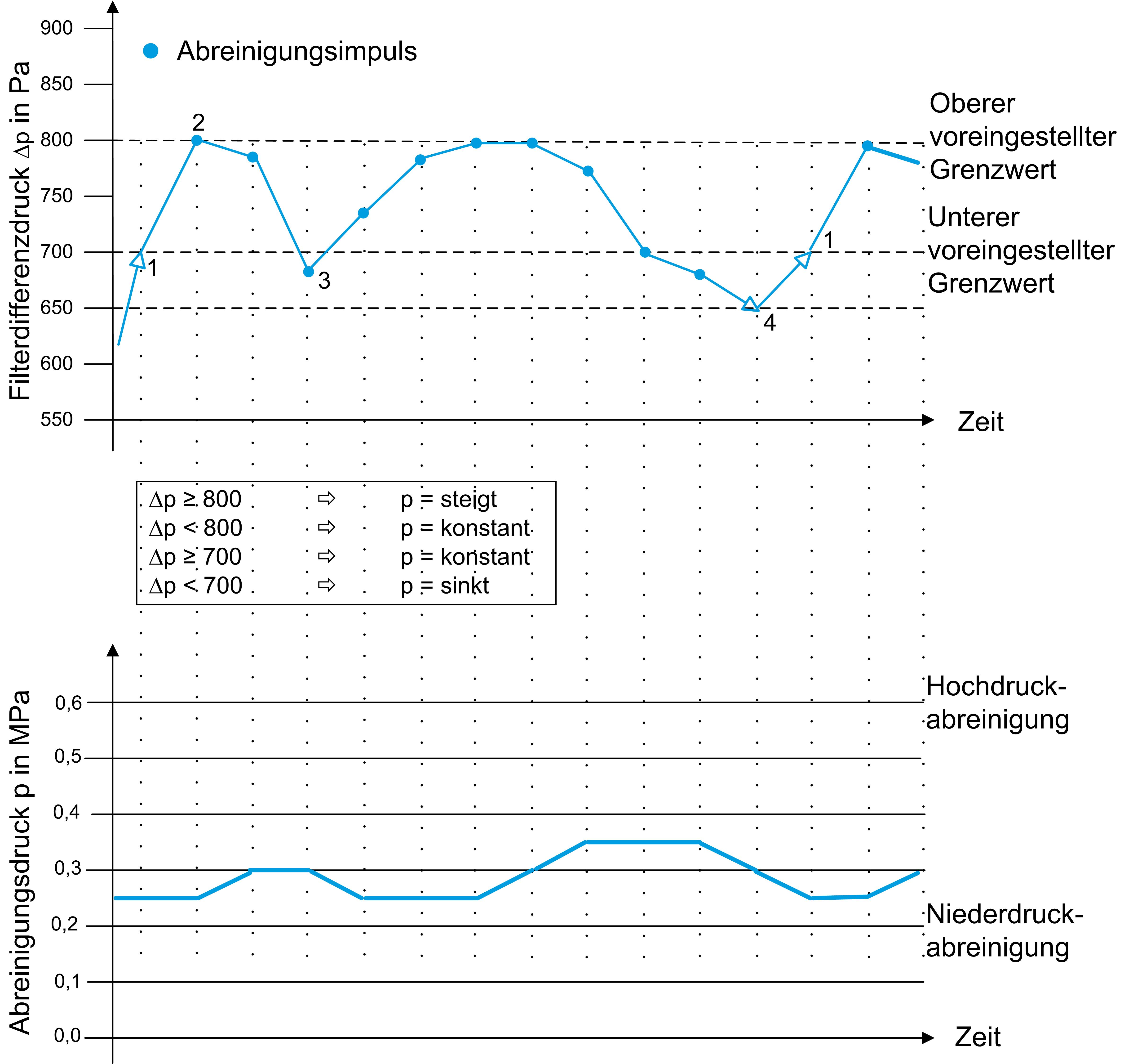 Regelcharakteristik der vordruckgeregelten Abreinigung, bei dem der zur Abreinigung notwendige Druckluft-Tankdruck durch das Betriebsverhalten des Filters bestimmt wird. Das obere Diagramm zeigt den Filterdifferenzdruck, im unteren Diagramm ist der Tankdruck (=Abreinigungsdruck) dargestellt.